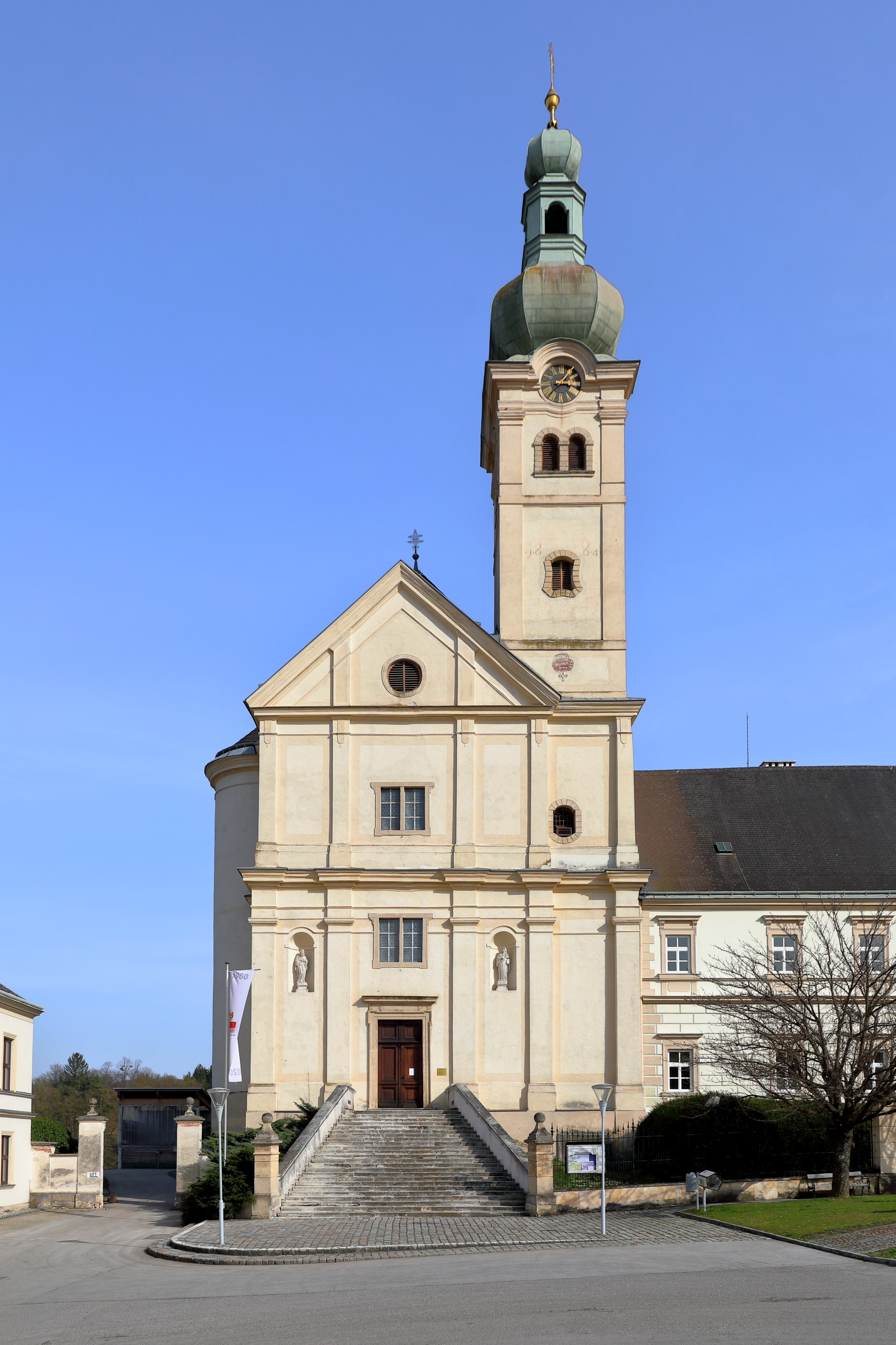 Westansicht der röm.-kath. Pfarr- und Wallfahrtskirche hl. Nikolaus in der burgenländischen Marktgemeinde Lockenhaus.Die Grundsteinlegung der Kirche fand am 2. Juli 1656 statt. Wegen Baumängel (Risse in den Seitenwänden) verzögerte sich der Bau und daher erfolgte die Einweihung erst am 15. September 1669. Gestiftet wurde die Kirche vom Besitzer der Herrschaft Lockenhaus, Graf Franz III. Nádasdy. Das Kirchenschiff ist 18 Meter hoch, der Turm 57,5 Meter. Der Baustil ist Frühbarock, der Kircheneingang ist noch im Renaissancestil gehalten.